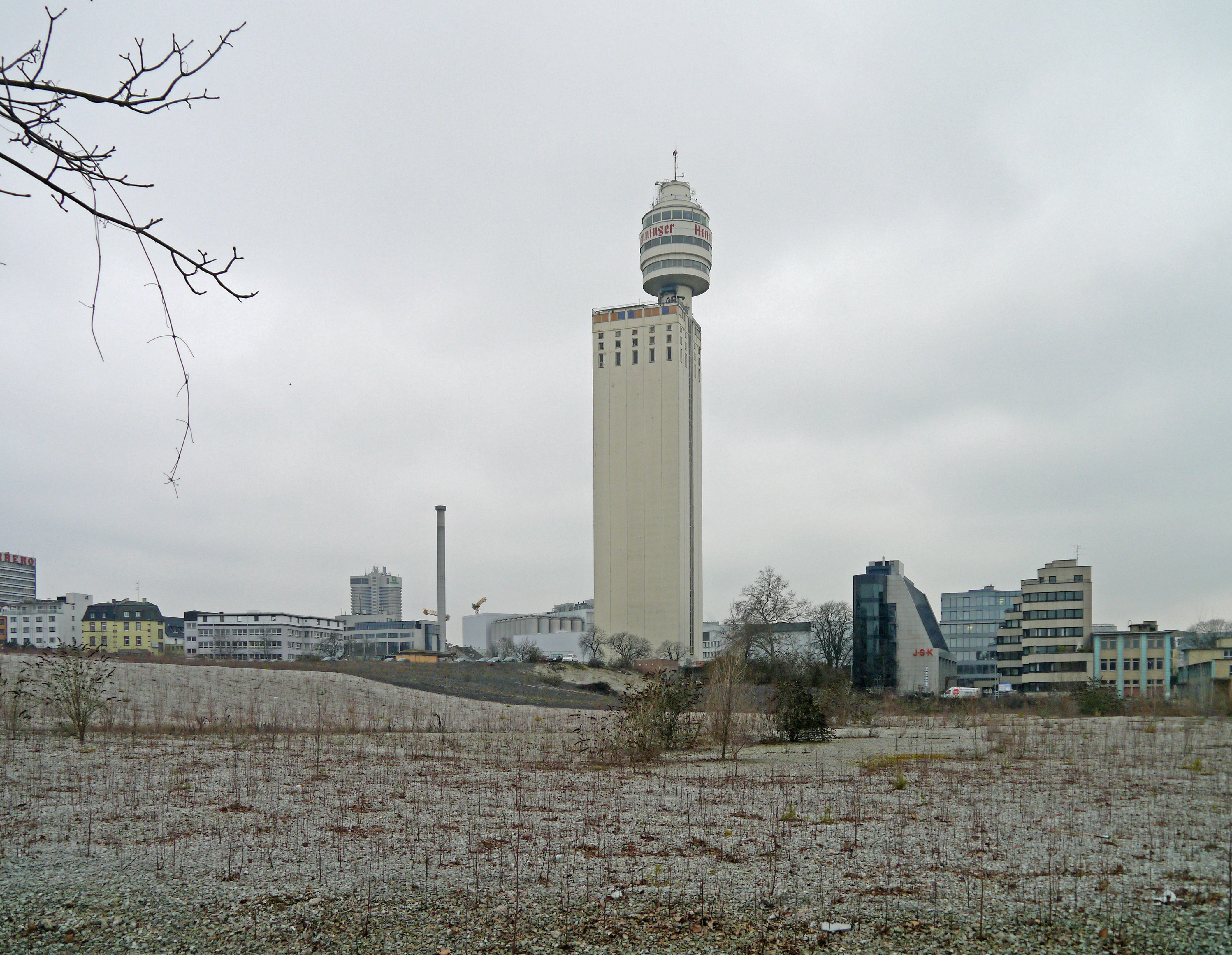 Das ehemalige Henninger-Bräu-Gelände mit dem Henninger-Turm, auf beiden Seiten des Hainer Weges, 2013 in Frankfurt am Main, Stadtteil Sachsenhausen.